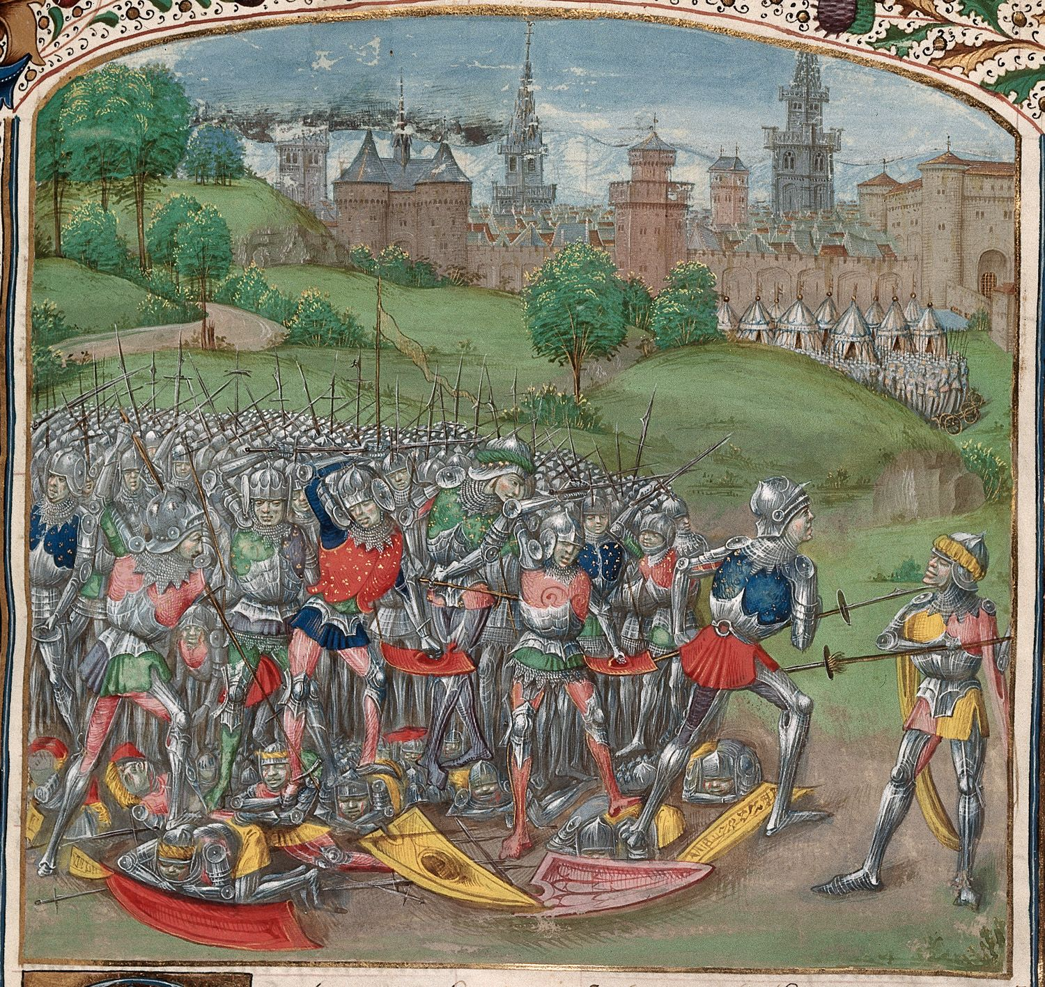 Royal 15 E IV f. 120 Death of Hengist